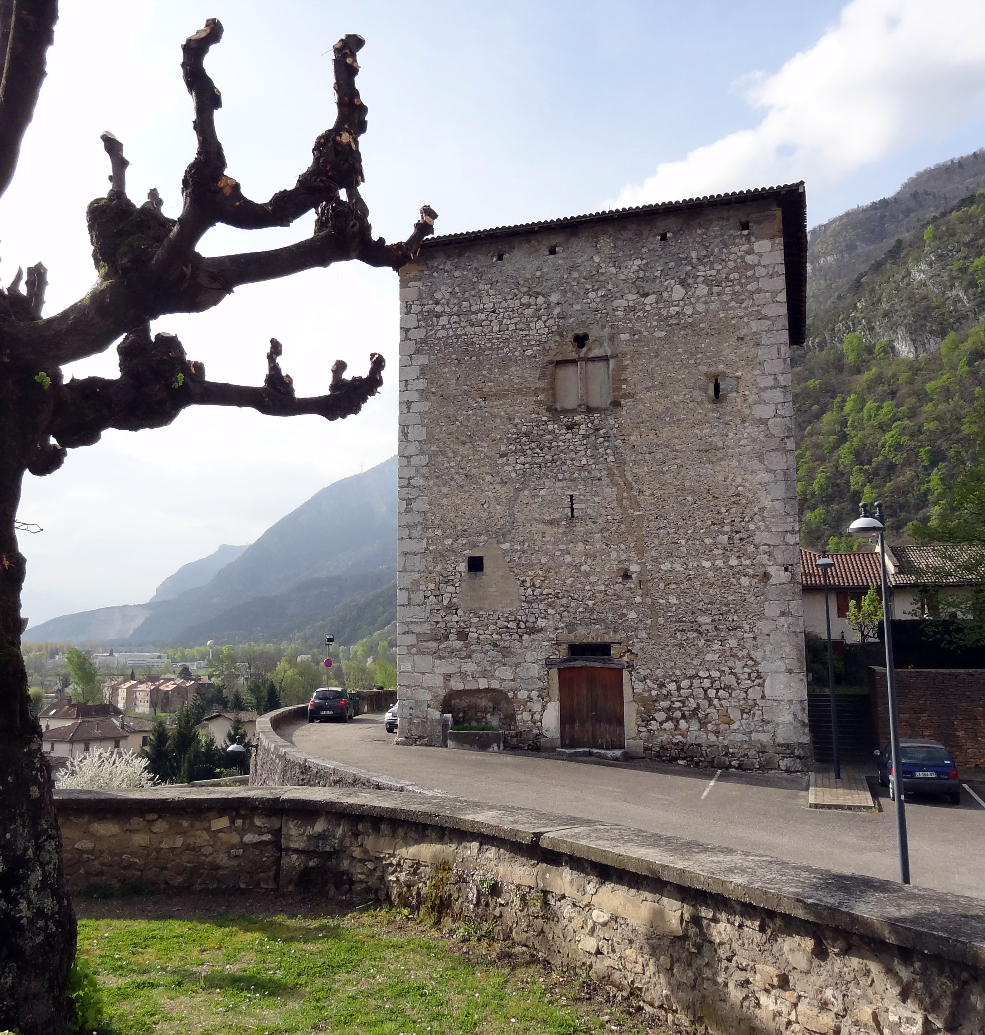 Cette tour dite Tour des Templiers à Veurey-Voroize en Isère est un édifice fortifié rectangulaire (13x15m environ), du 13e siècle.